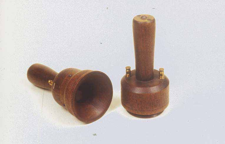 È costituito da un cilindro e un padiglione circolare (cavità acustica) entrambi realizzati in legno. All'interno del cilindro è inserito un magnete rettilineo. Sul polo di questo magnete è inserito un elettromagnete cilindrico i cui capi terminano a due serrafili posti sul retro del padiglione. Davanti all'elettromagnete, in corrispondenza del padiglione, è fissata una membrana in ferro dolce. Funzione Questo telefono di Meucci è servito alle prime sperimentazioni dell'inventore italiano sulla trasmissione della voce. Modalità d'uso Questo telefono funzionava in coppia con un suo analogo. Due telefoni di Meucci venivano messi in collegamento e alternativamente funzionavano da trasmettitore e da ricevitore Il telefono di Meucci, utilizzato come trasmettitore, convertiva le vibrazioni meccaniche della membrana, colpita dalle vibrazioni sonore prodotte dalla voce, in variazioni elettriche nell'elettromagnete. Ad ogni suono corrispondeva una precisa ed univoca variazione elettrica (corrente modulata) Tramite il collegamento questo segnale elettrico arrivava ai serrafili dell'altro telefono (ricevitore). Qui la corrente modulata, circolando nell'elettromagnete, creava un campo magnetico variabile. La membrana, di ferro dolce, veniva così messa in oscillazione. Data la corrispondenza tra vibrazioni meccaniche, acustiche e corrente elettrica, le vibrazioni della membrana restituivano esattamente i suoni in ingresso nel trasmettitore. Notizie storico-critiche Questa replica del telefono di Meucci, modello del 1857, insieme all'altra del modello del 1867, vennero fatti costruire a cura del CNR Consiglio Nazionale delle Ricerche (sotto la Presidenza Guglielmo Marconi), dalle Officine Galileo di Firenze per inviarli all'Esposizione Internazionale "A Century of Progress" tenutasi a Chicago nel 1933.